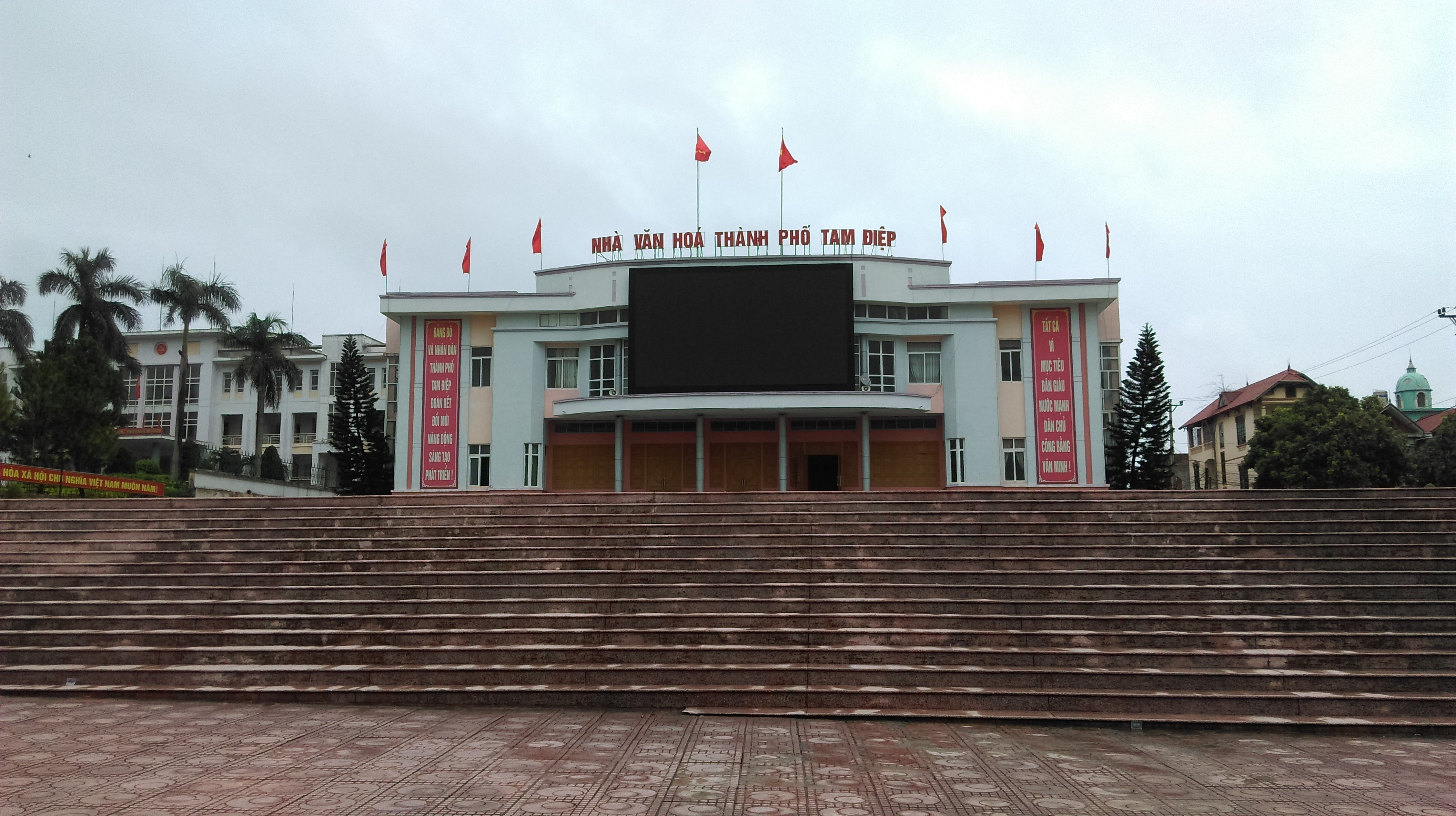 Nhà Văn hóa Thành phố Tam Điệp, Ninh Bình